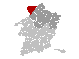 Lec'hiañ Lommel (Belgia).